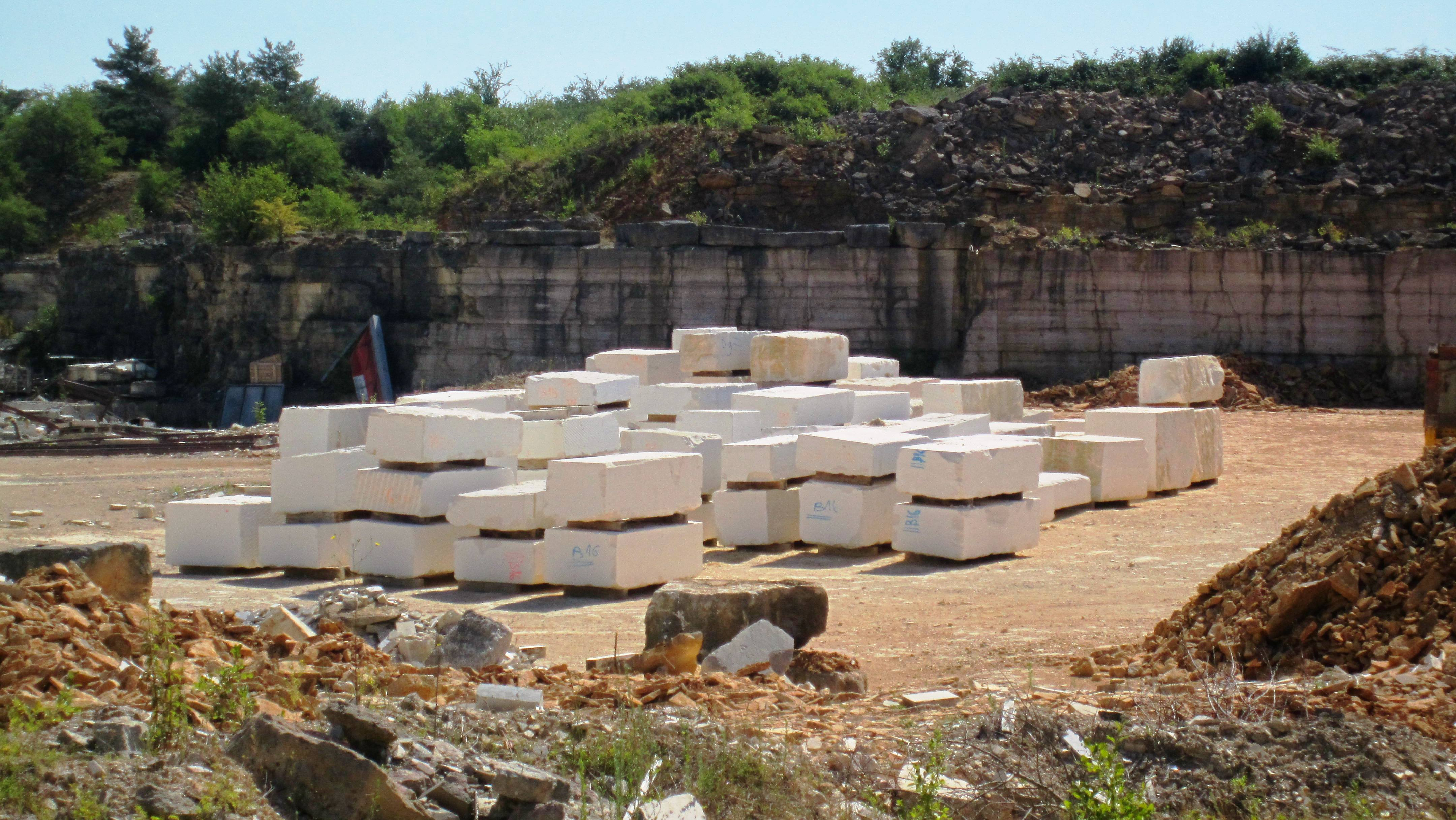 Carrière de pierre à Etrochey (Côte-d'Or)